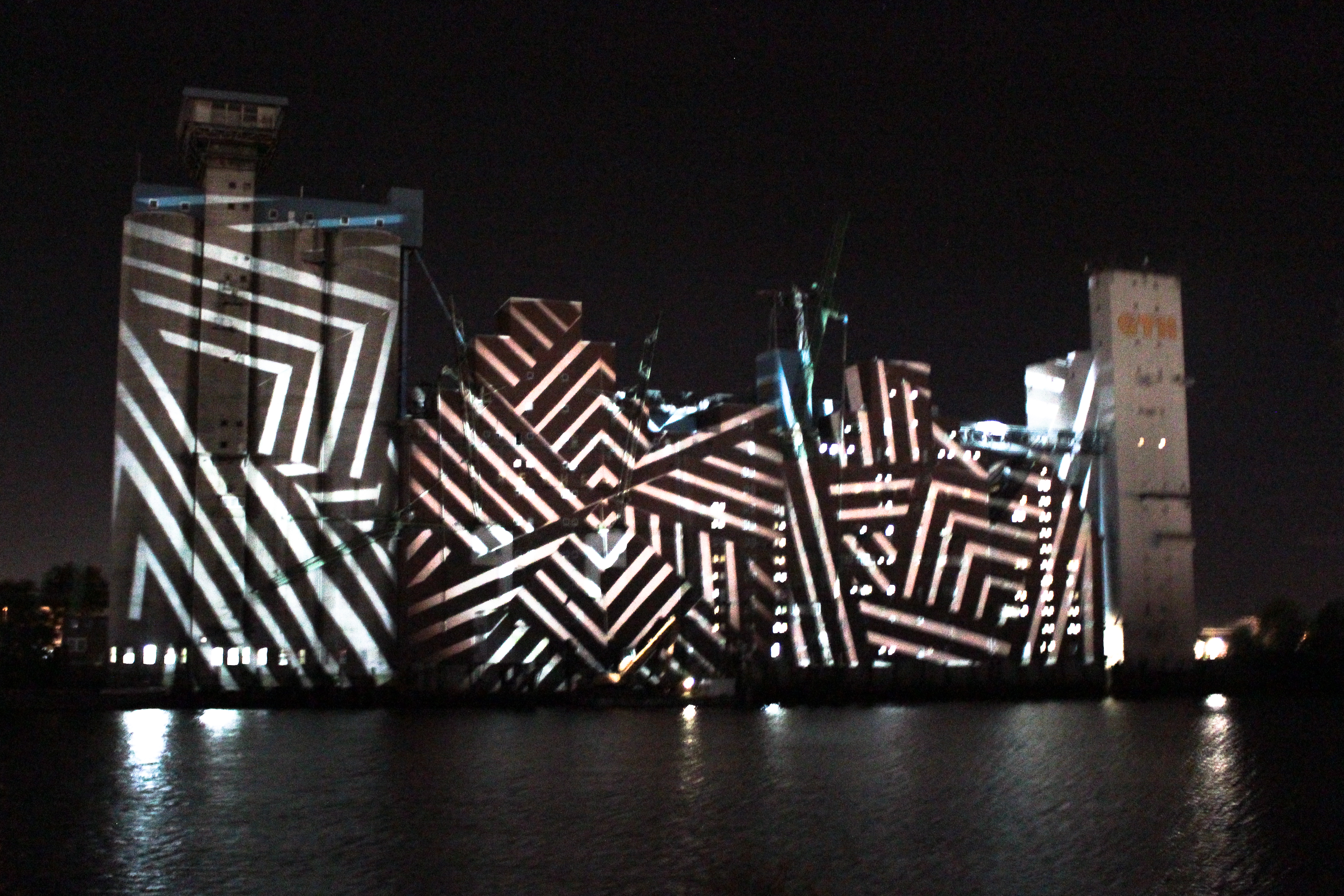 MS Dockville 2012 Taken on August 11, 2012